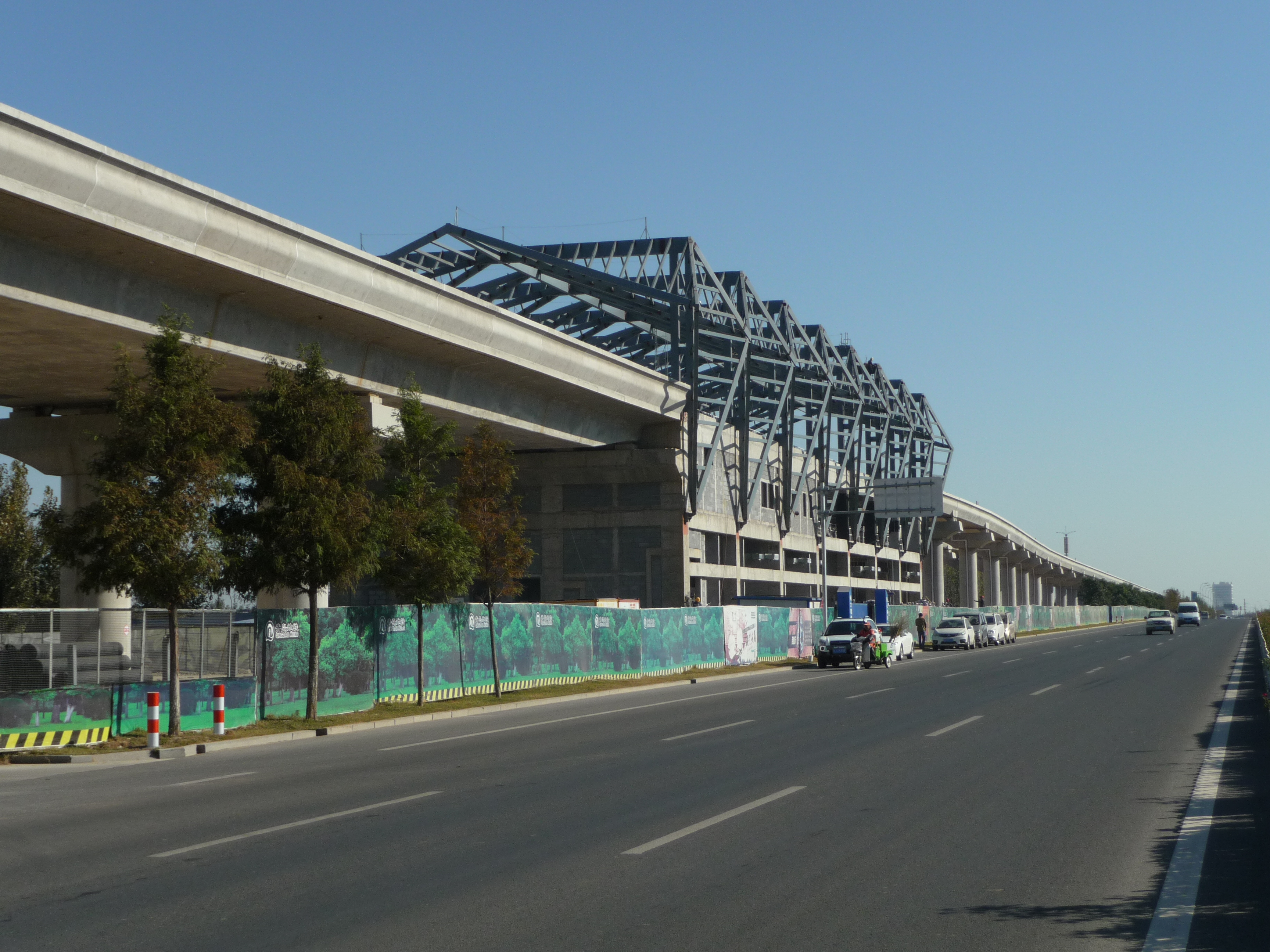 青岛地铁13号线大珠山站2017年11月工程